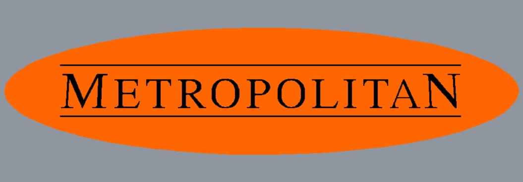 Logo der Metropolitan Express Train GmbH - Deutsche Bahn Gruppe